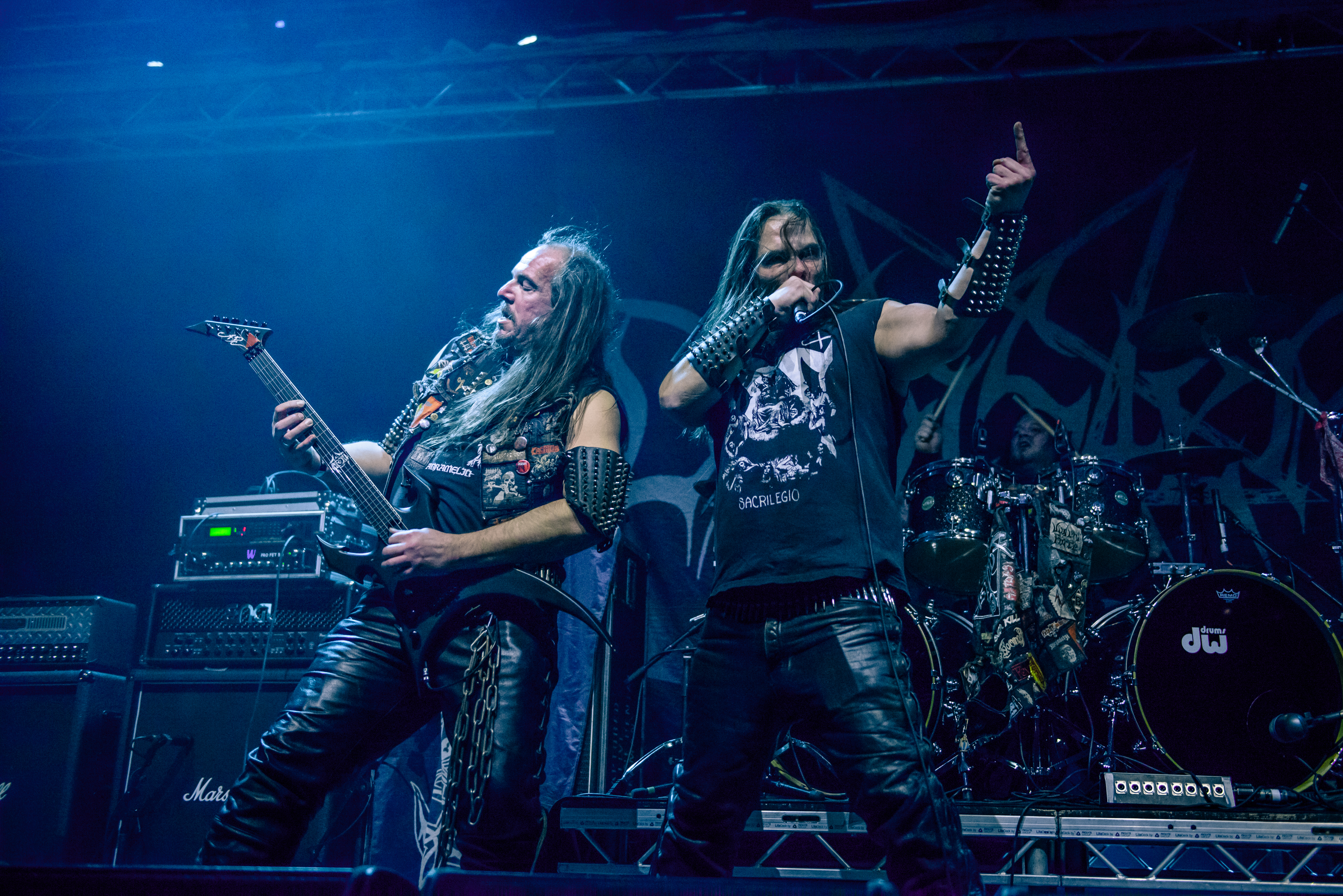 'Ruhrpott Metal Meeting 2016; Oberhausen Turbinenhalle': 'Desaster'